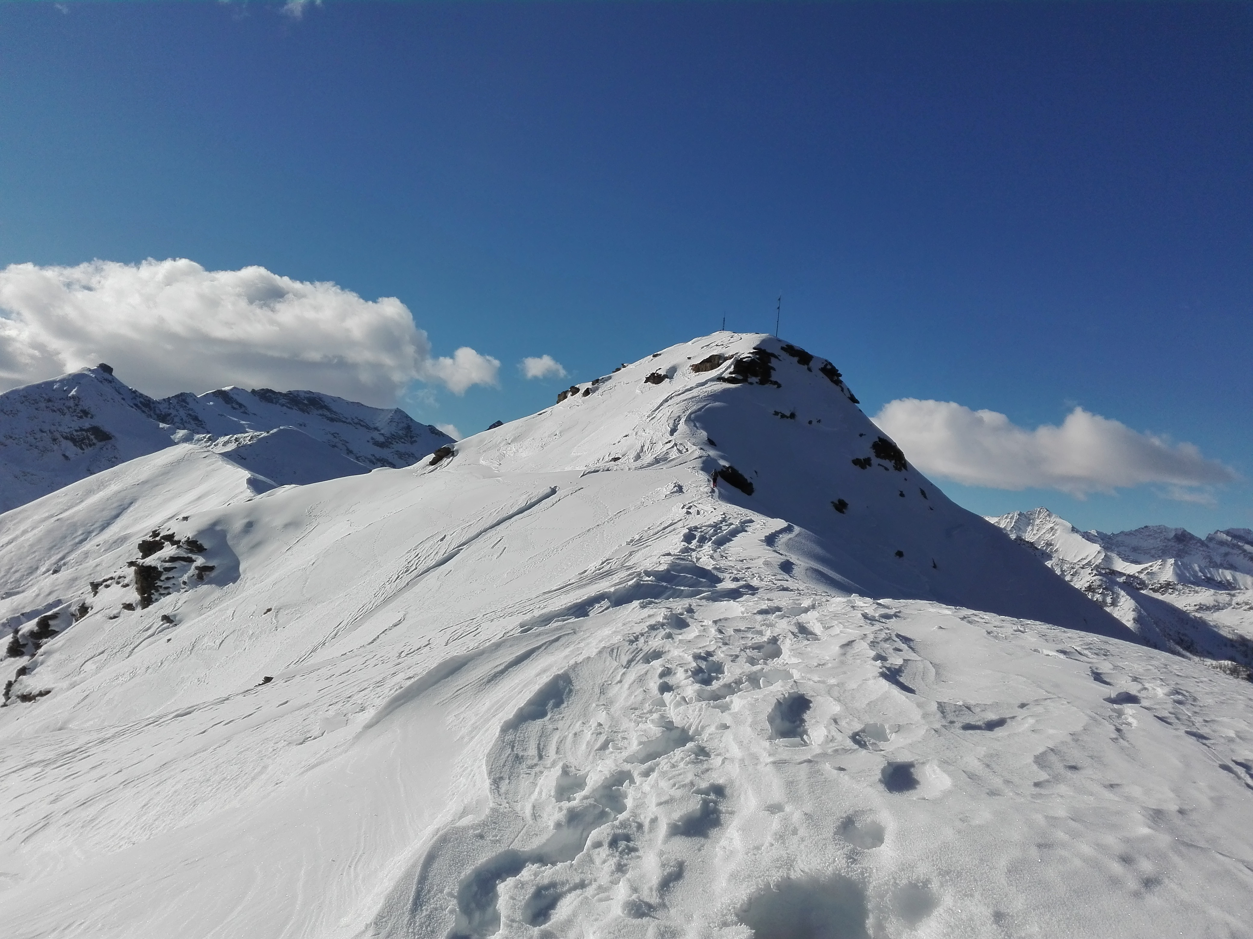 La vetta del Grand Truc montagna tra la val Pellice e la val Chisone - Provincia di Torino - Piemonte - Italia